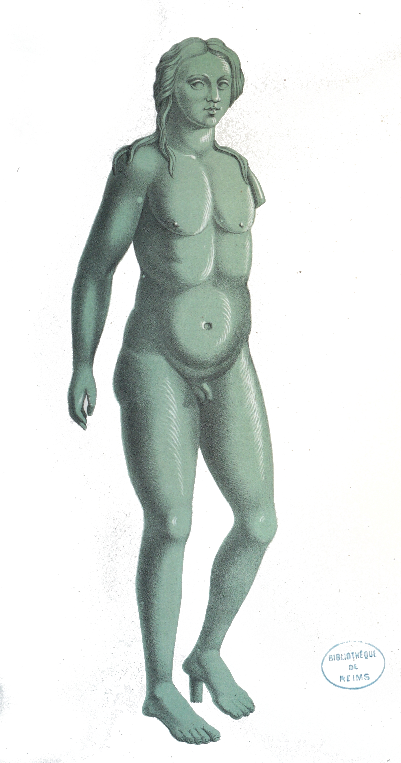 dessin in Portefeuille archéologique de la Champagne